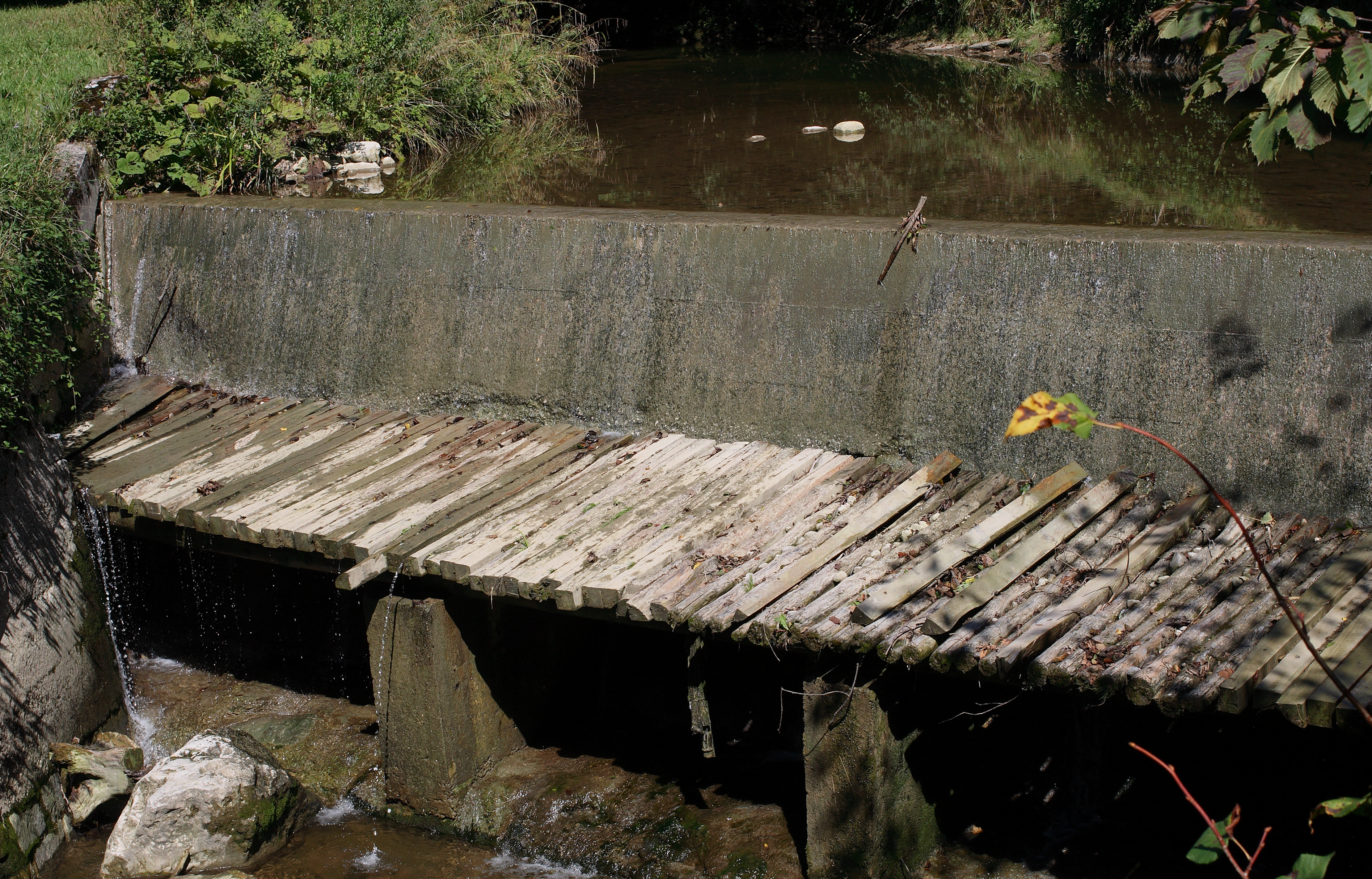 Wehr im Schmiedleithenbach nahe dem Freilichtmuseum Schmiedleithen